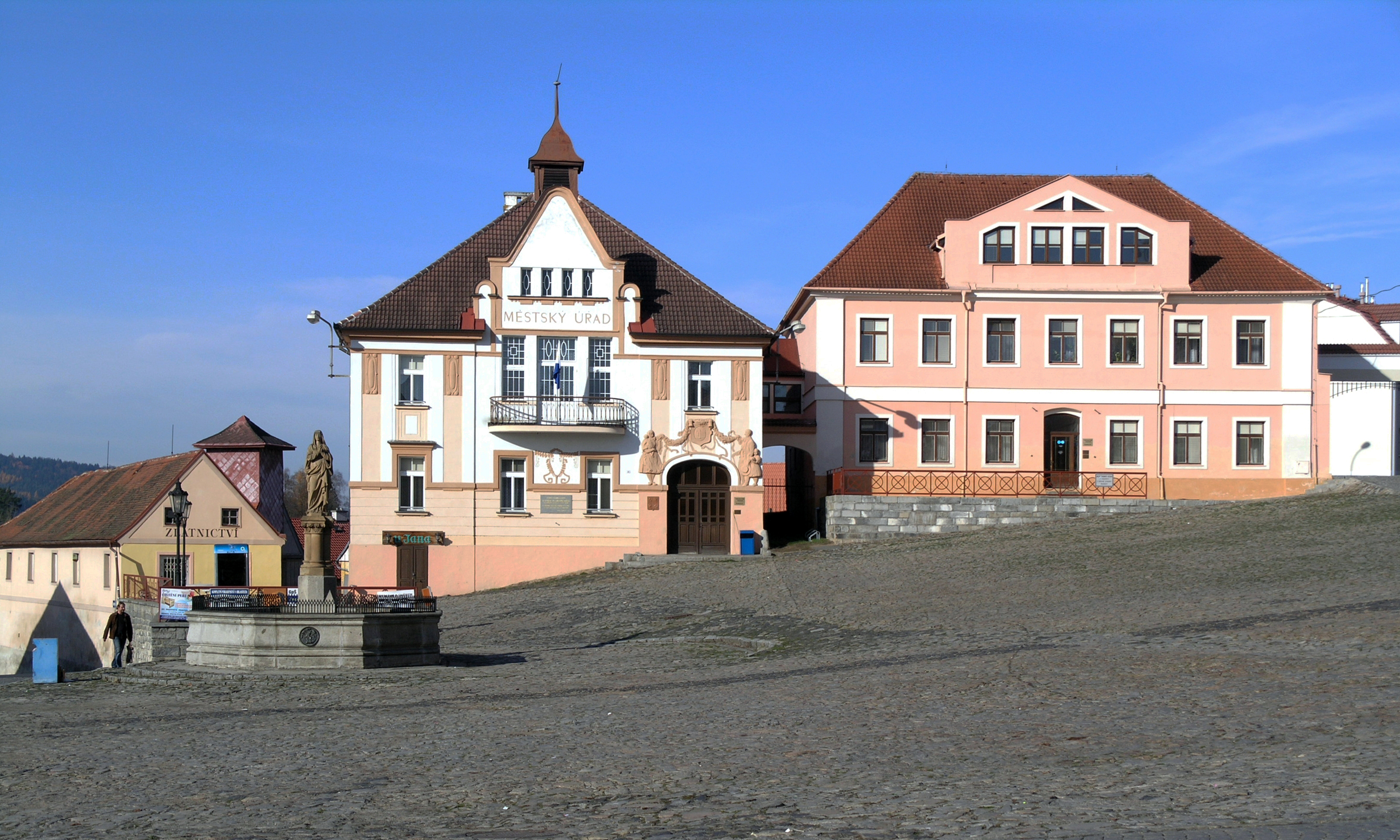 Nepomuk